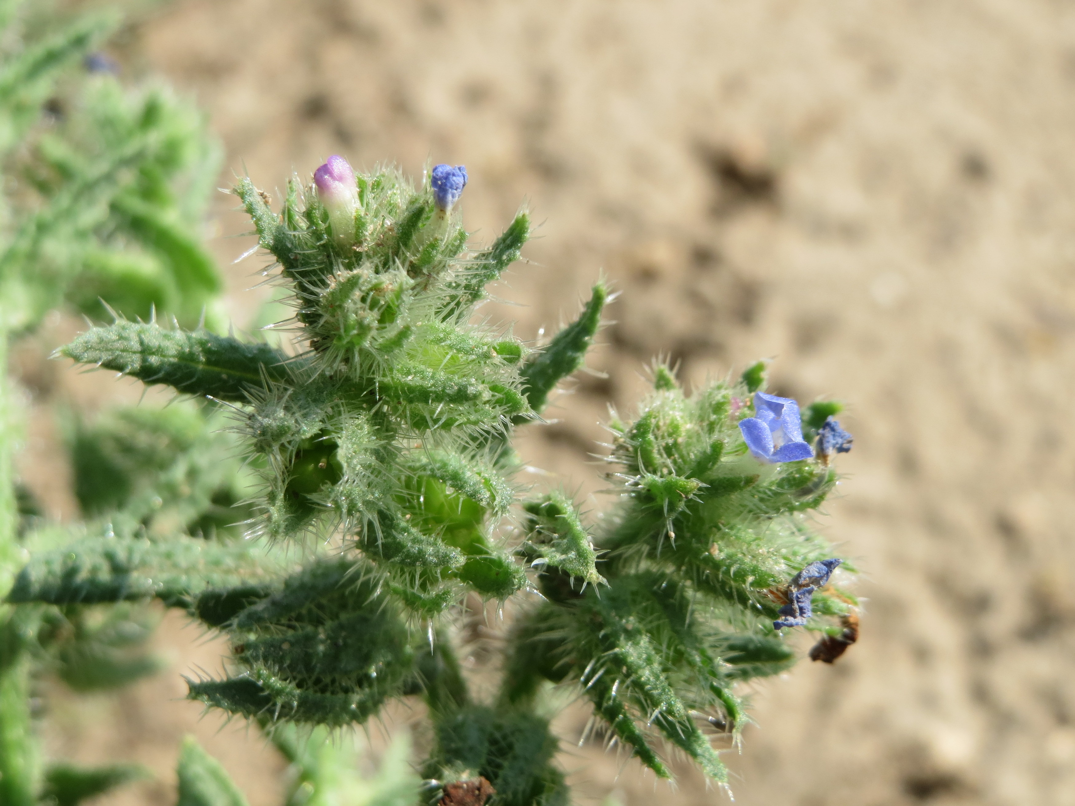 Acker-Ochsenzunge (Anchusa arvensis) bei Hockenheim